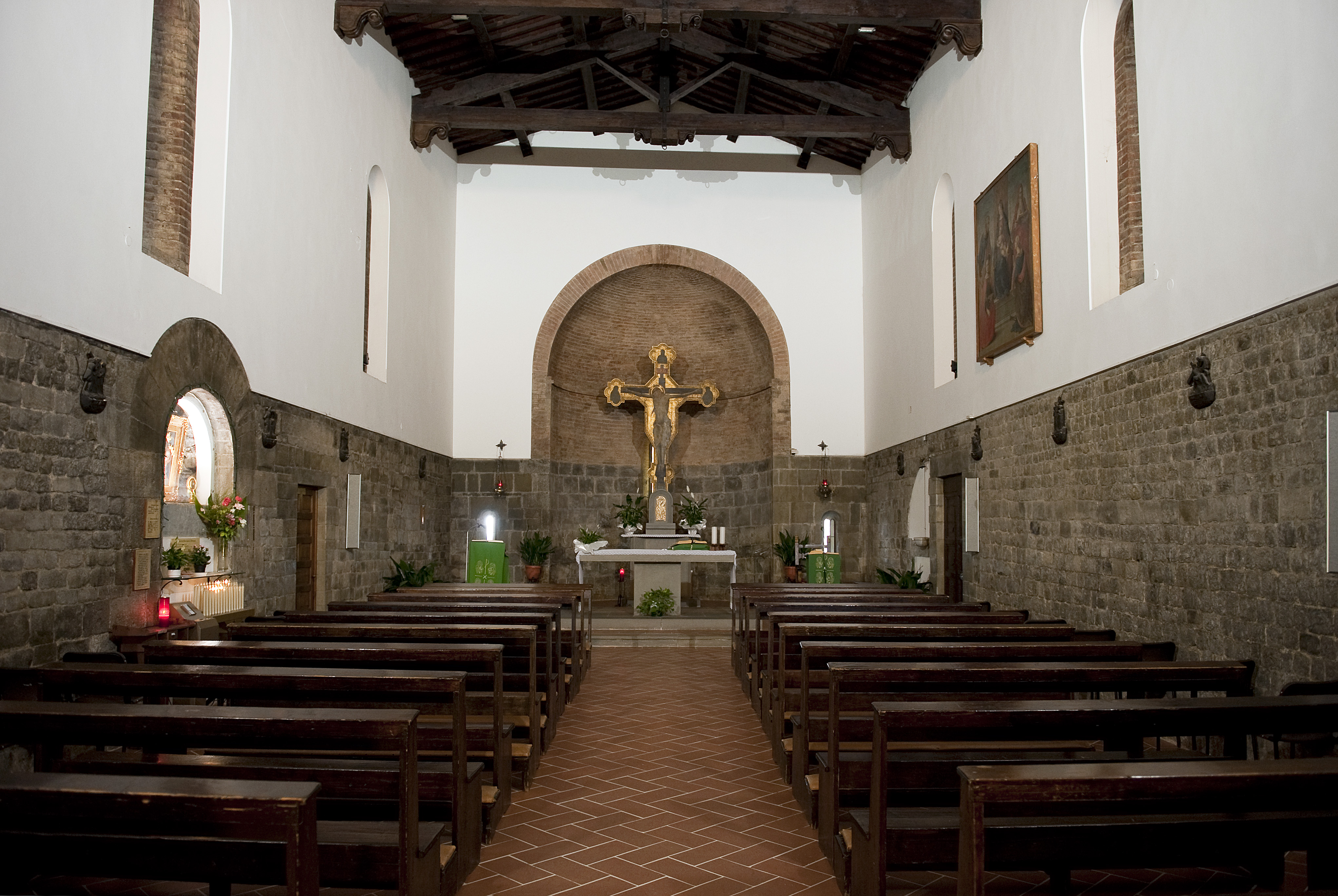 Chiesa di San Pietro a Marcignana, Empoli -- Interno